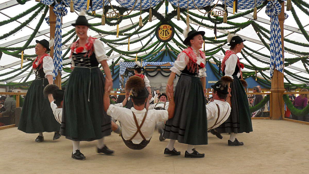 200 Jahre Oktoberfest (1810 - 2010) - Bavaria today Das Oktoberfest in München (mundartlich auch Wiesn) ist eines der größten Volksfeste der Welt. Es findet seit 1810 auf der Theresienwiese in München statt und wird Jahr für Jahr von rund sechs Millionen Menschen besucht. Für das Oktoberfest brauen die Münchner Brauereien ein spezielles Bier (Wiesn Märzen) mit mehr Stammwürze und damit auch mit höherem Alkoholgehalt (rund 6–7 %). Begonnen hat das Oktoberfest mit der Hochzeit von Kronprinz Ludwig I. und Prinzessin Therese im Jahr 1810. Zu diesem Anlass wurde eine fünf Tage dauernde Feier für das Volk ausgerichtet. Beendet wurde das Volksfest mit einem Pferderennen vor den Toren der Stadt München. Damals lag die heutige Theresienwiese nicht in München, sondern ausserhalb der Stadtmauern.